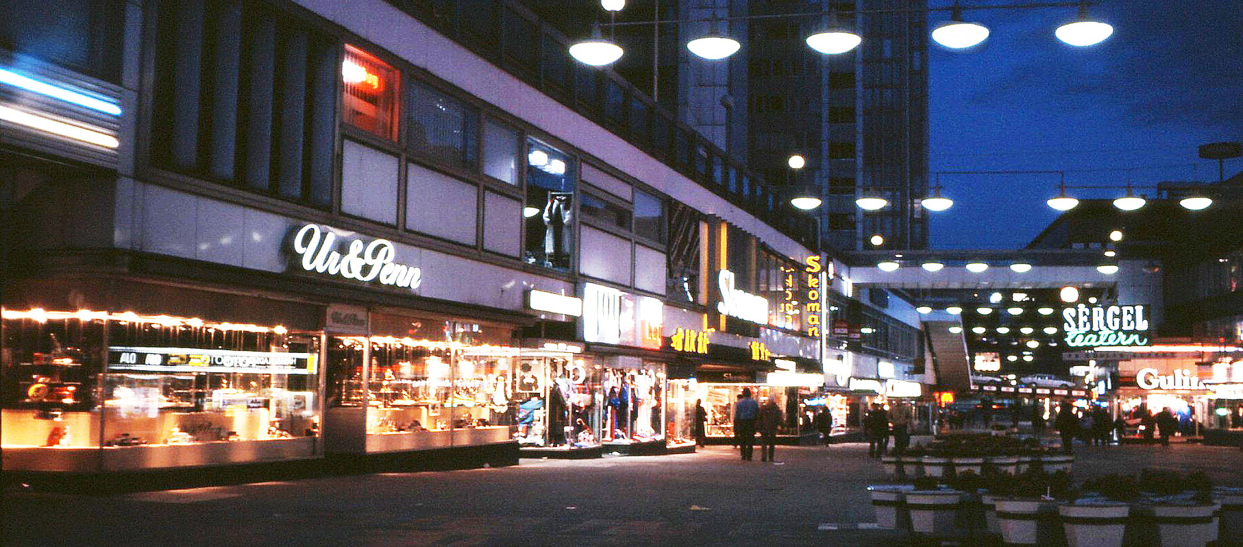 Sergelgatan i Stockholm 1984